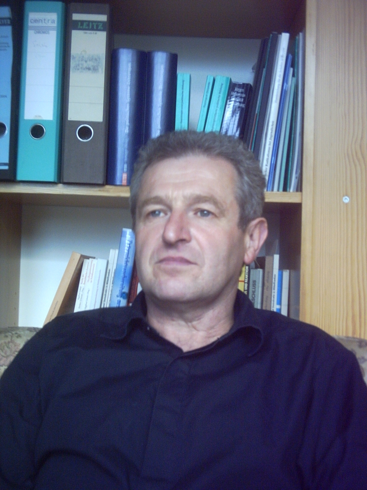 Prof. Dr. Armin Scherb